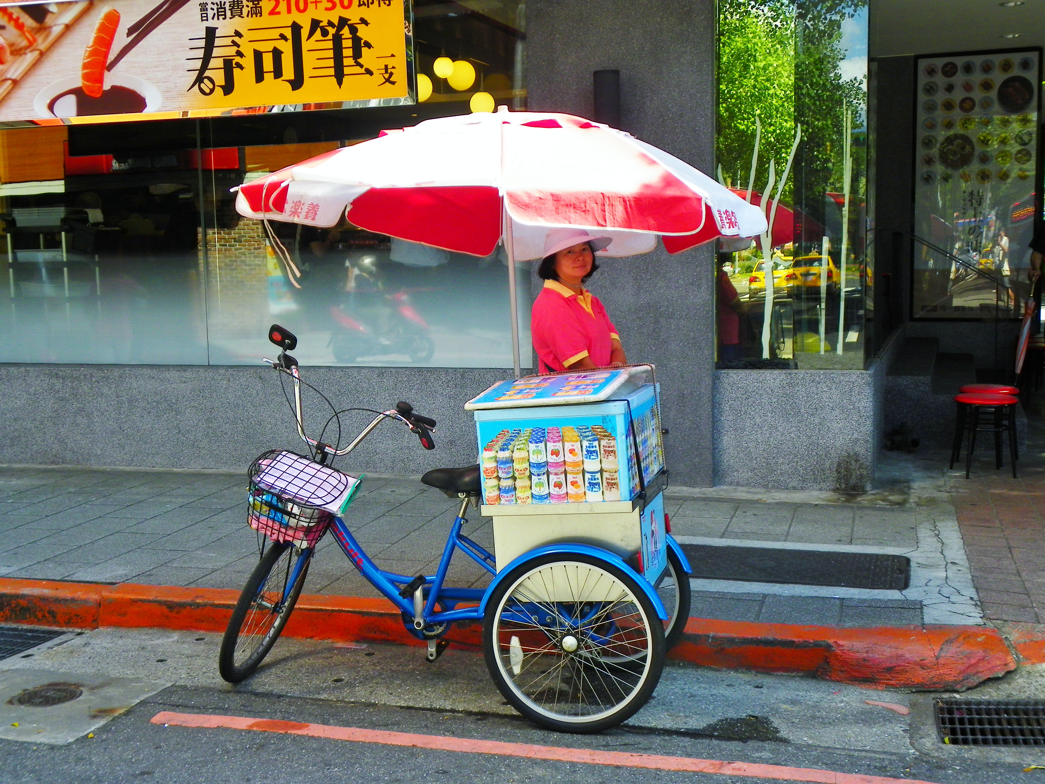 中文（台灣）: 臺北市松山區新東街11巷與三民路巷口的養樂多三輪車與養樂多媽媽。